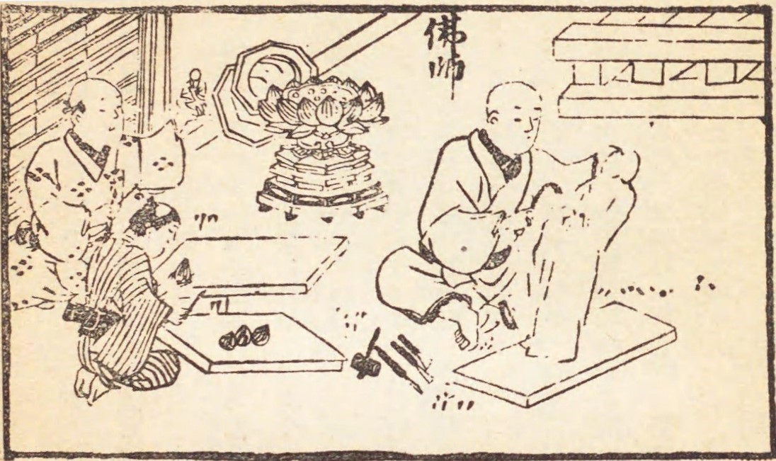 仏師 增補 江戶惣鹿子名所大全